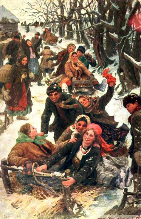 Ф. В. Сычков. Праздничная забава. Дореволюционная открытка.